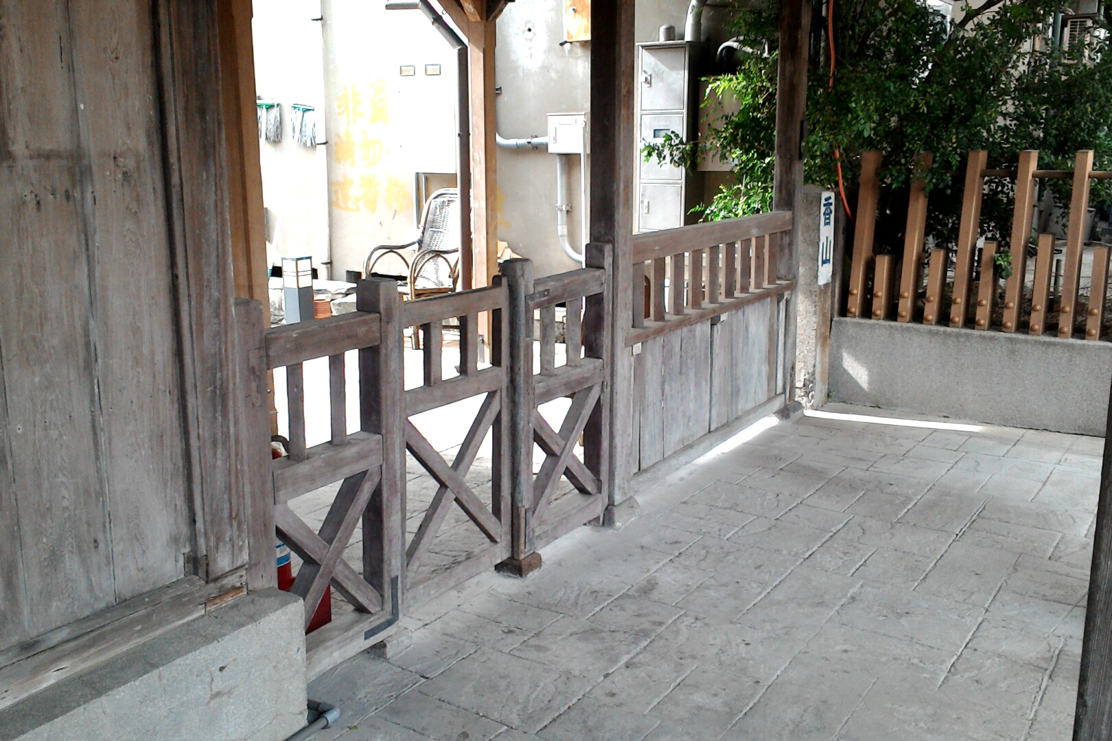 台鐵香山車站柵欄,台灣省新竹市香山區香山聯里朝山里